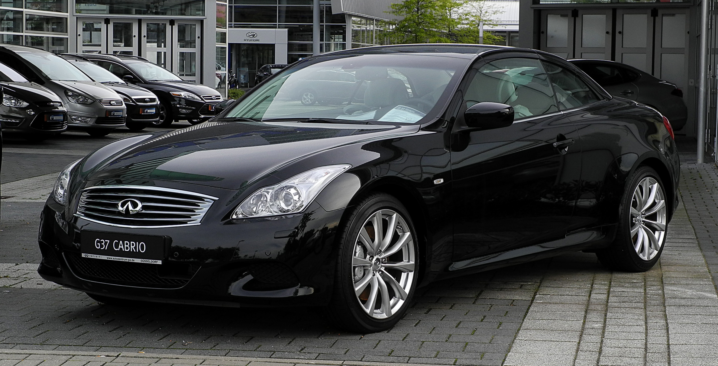 Infiniti G37 Cabriolet GT Premium (V36, Facelift)